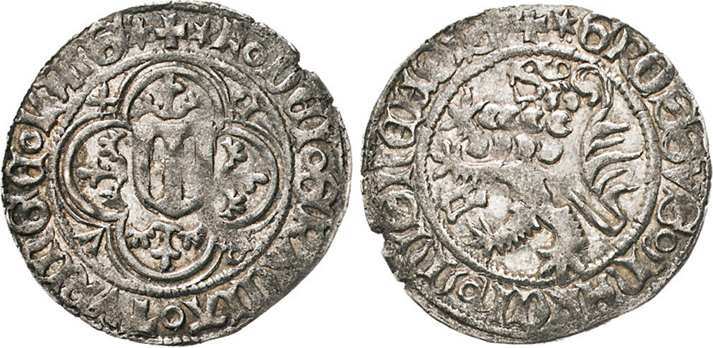 Neuer Schockgroschen o.J. (1444-1451), Münzstätte Zwickau oder Sangerhausen